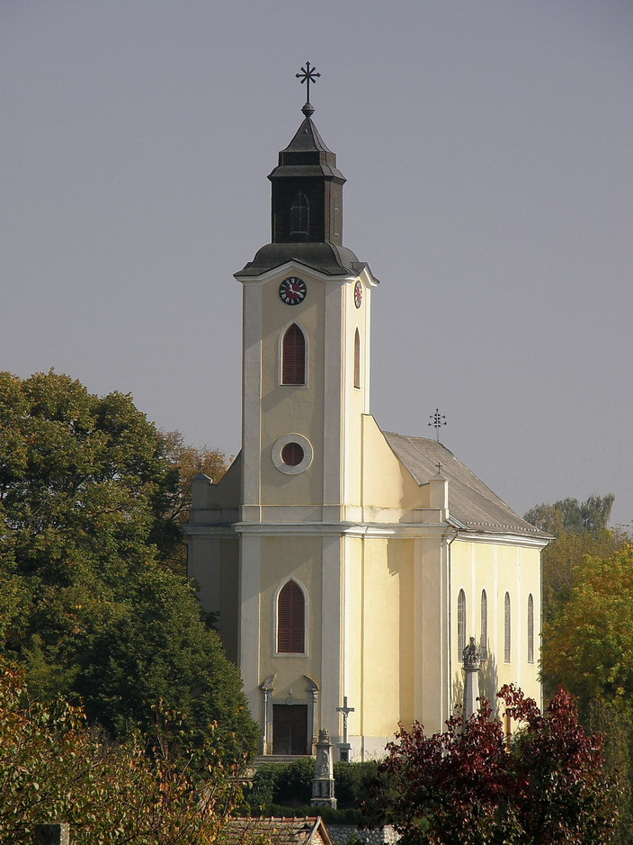 Rk. templom (Himesháza, Hősök tere)